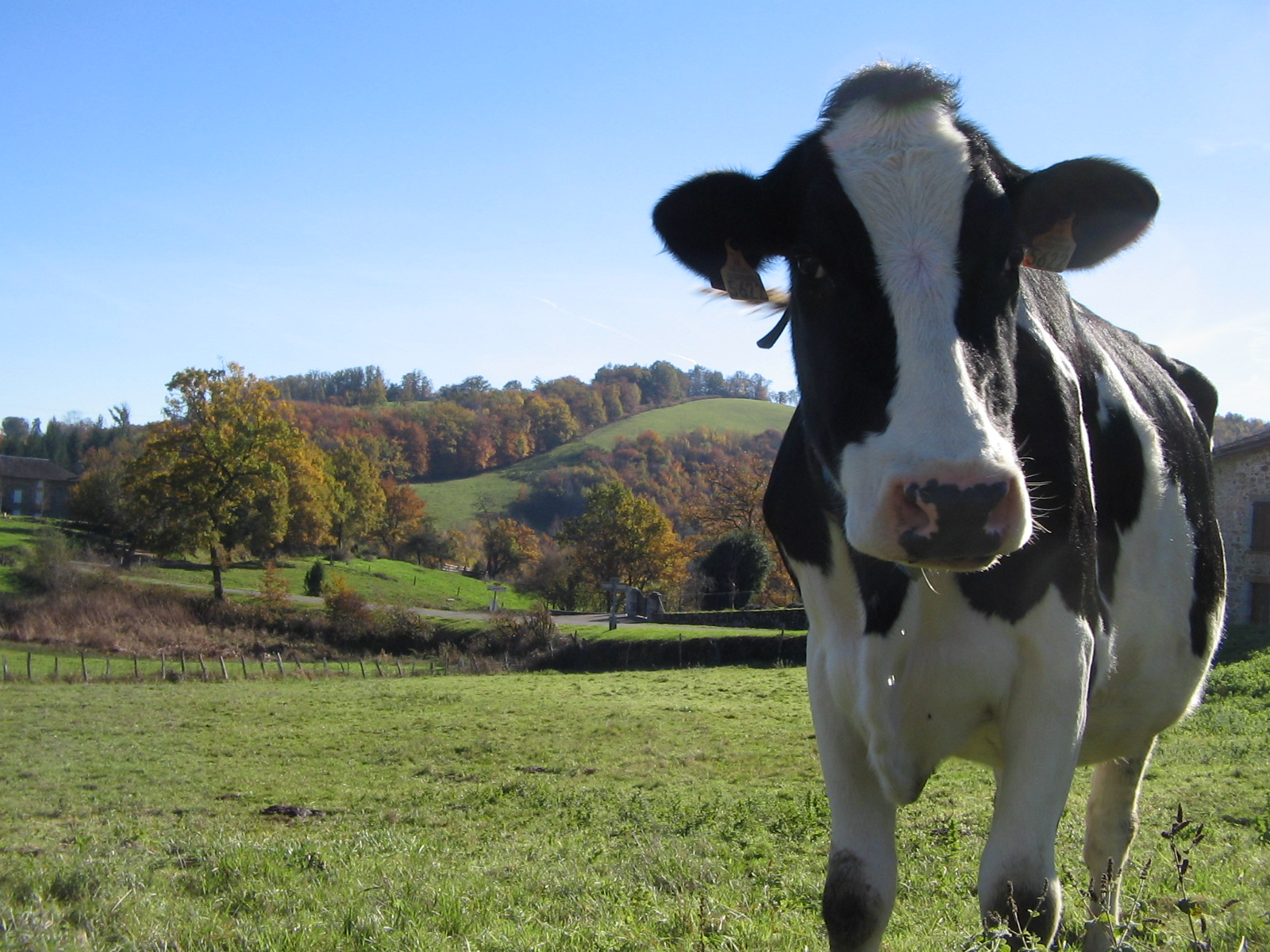 Un bovin à St-Hilaire dans le lot (46) en novembre 2012